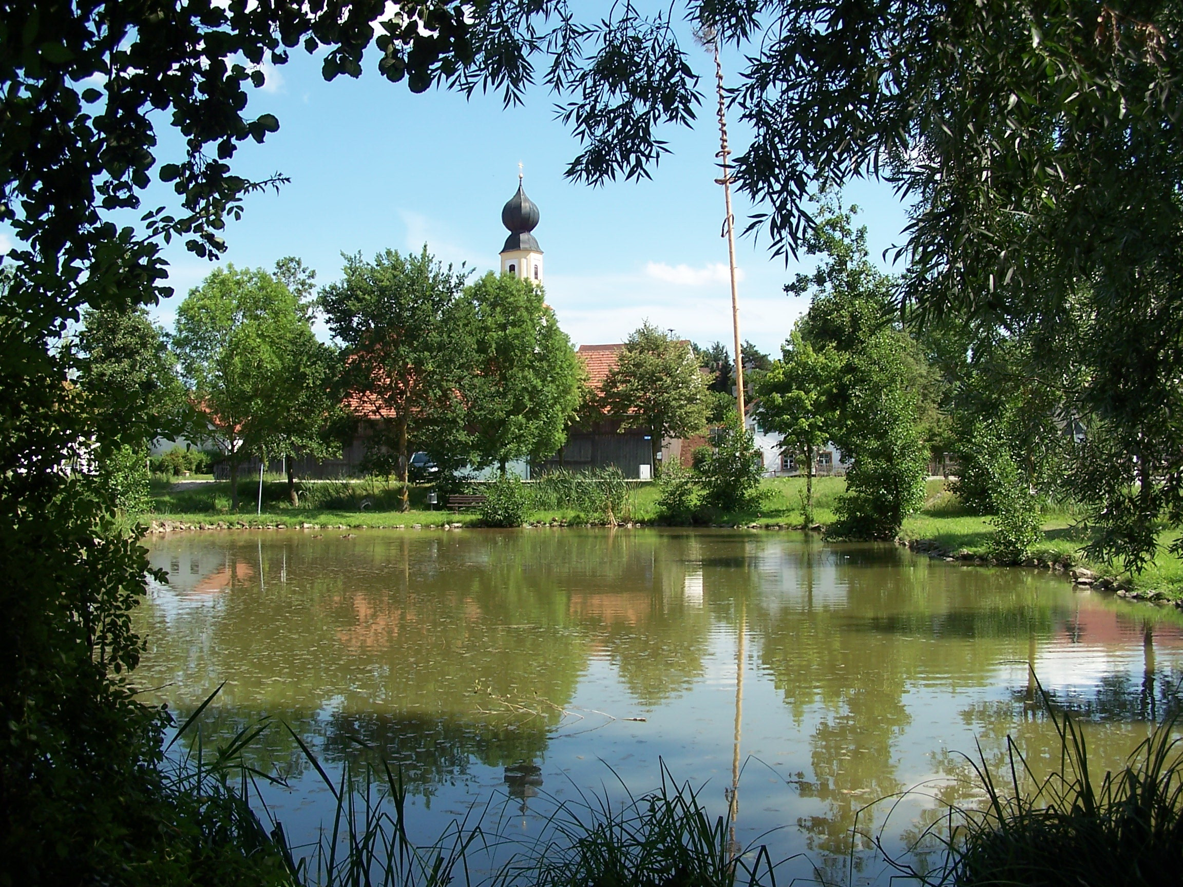 Ergoldsbach, Langenhettenbach 204. Filialkirche St. Petrus. Saalkirche mit Westturm, Friesband und Lisenengliederung. Westturm mit Achteckaufsatz und Zwiebelkuppel, 1764. Dorfweiher mit Spielplatz in der Dorfmitte.